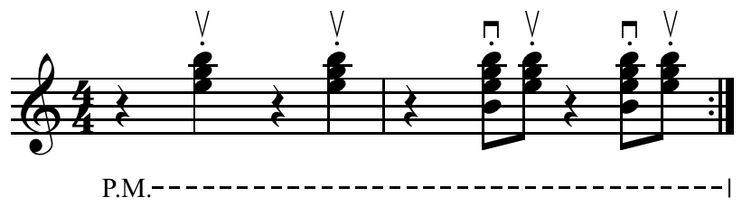 Reggae upstroke pattern.[1]